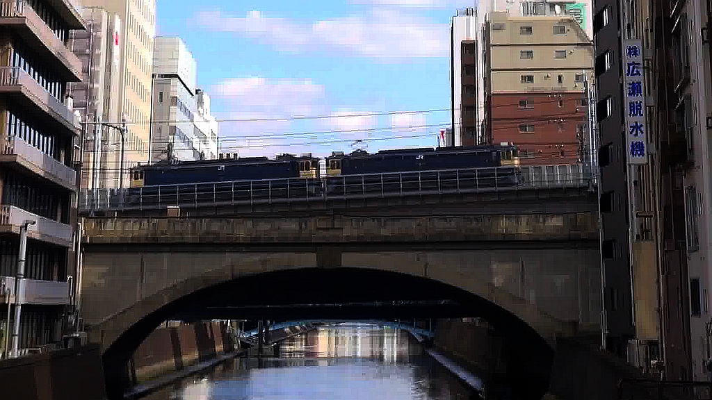 上野東京ラインを試運転するEF６５